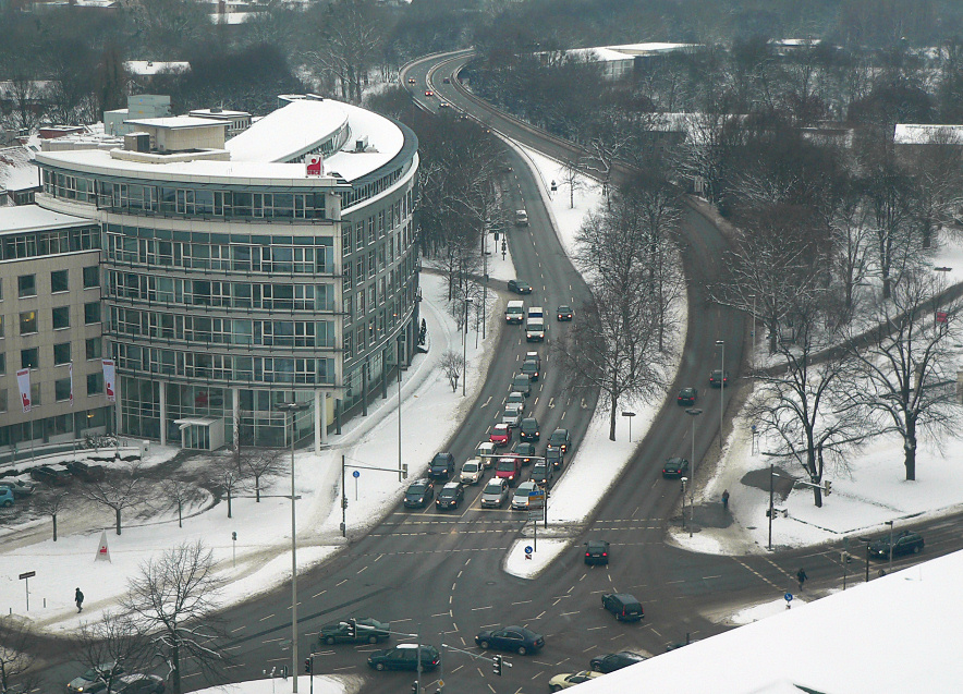 Bremer Damm und Königsworther Platz in Hannover